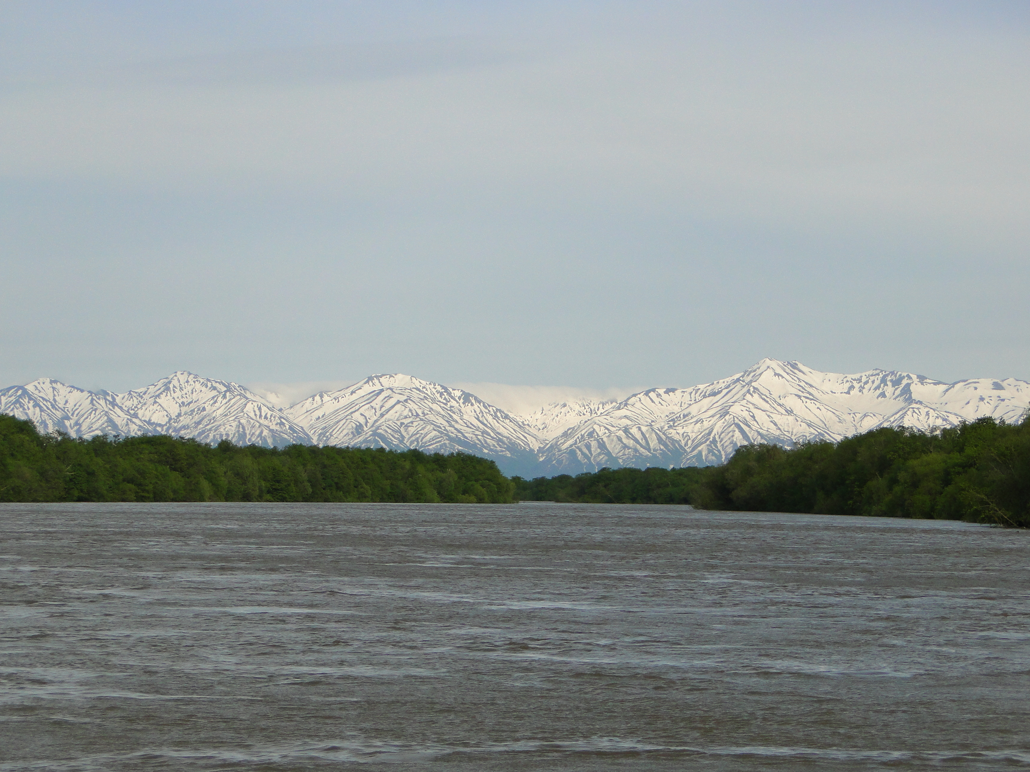 Вид на хребет Кумроч с западной стороны (с реки Камчатка)